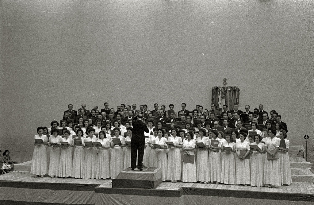 Título original: El Orfeón Donostiarra en un frontón de Eibar (5/14) Localización: Éibar (Guipúzcoa)